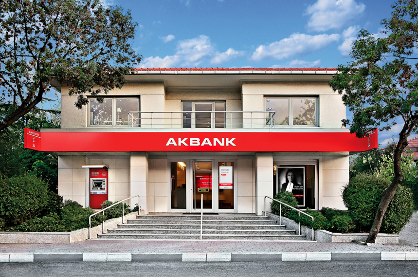 Şişli, İstanbul da yer alan bir Akbank banka şubesi.